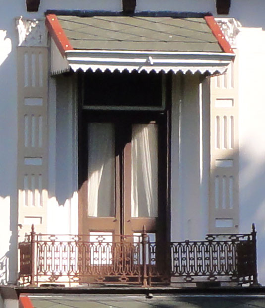 Boerderij "Hardenberg" Verlengde Hoofdweg 4 Nieuw-Beerta (detail - balkon in de zuidgevel)